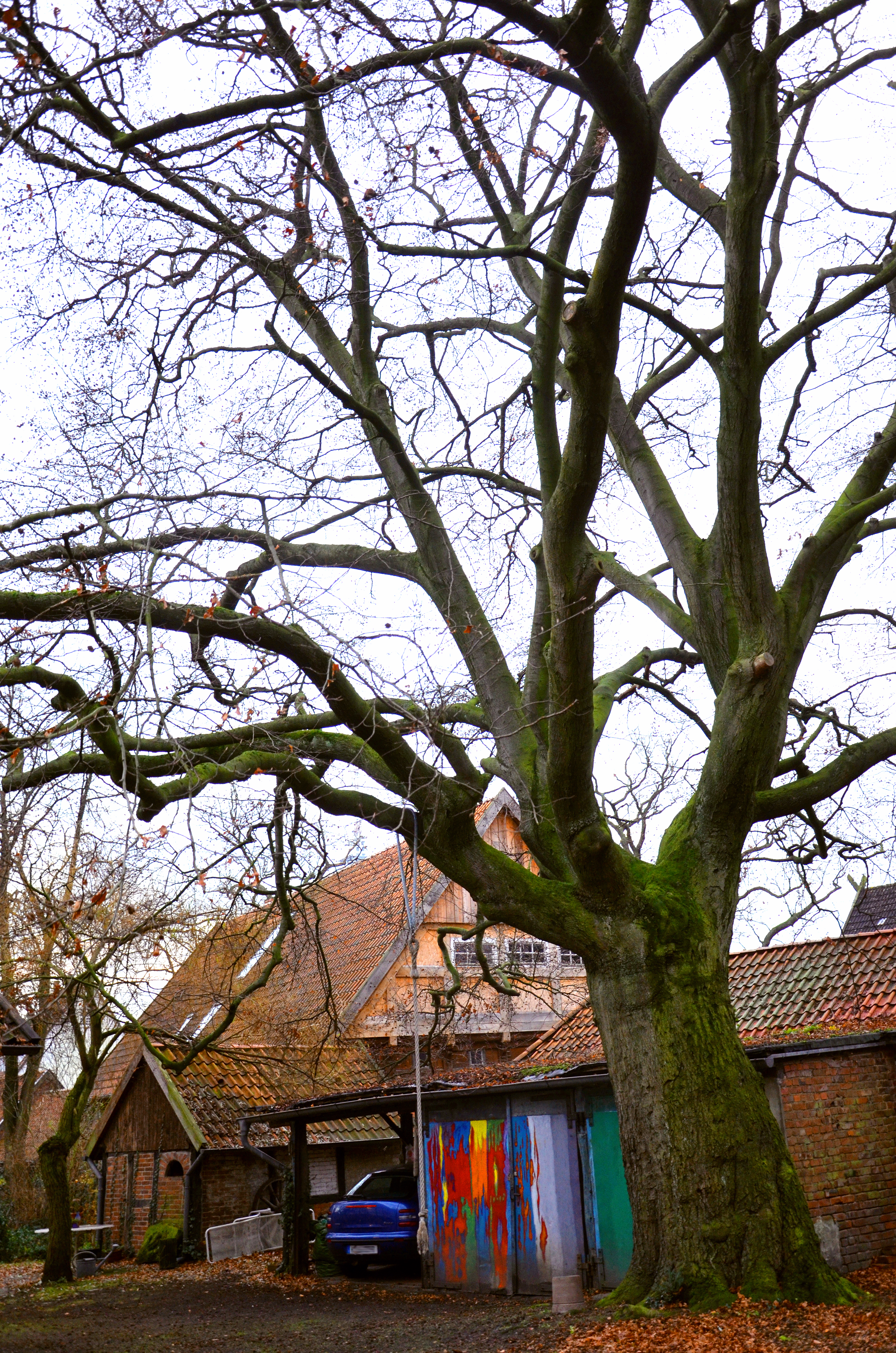 Die mehr als 200 Jahre alte Rotbuche (Fagus sylvatica) als Naturdenkmal auf dem Grundstück des denkmalgeschützten Fachwerkhauses Groß-Buchholzer Kirchweg 66 in Groß-Buchholz (Hannover), hier mit Blick auf weitere restaurierte Gebäude des ehemaligen ...